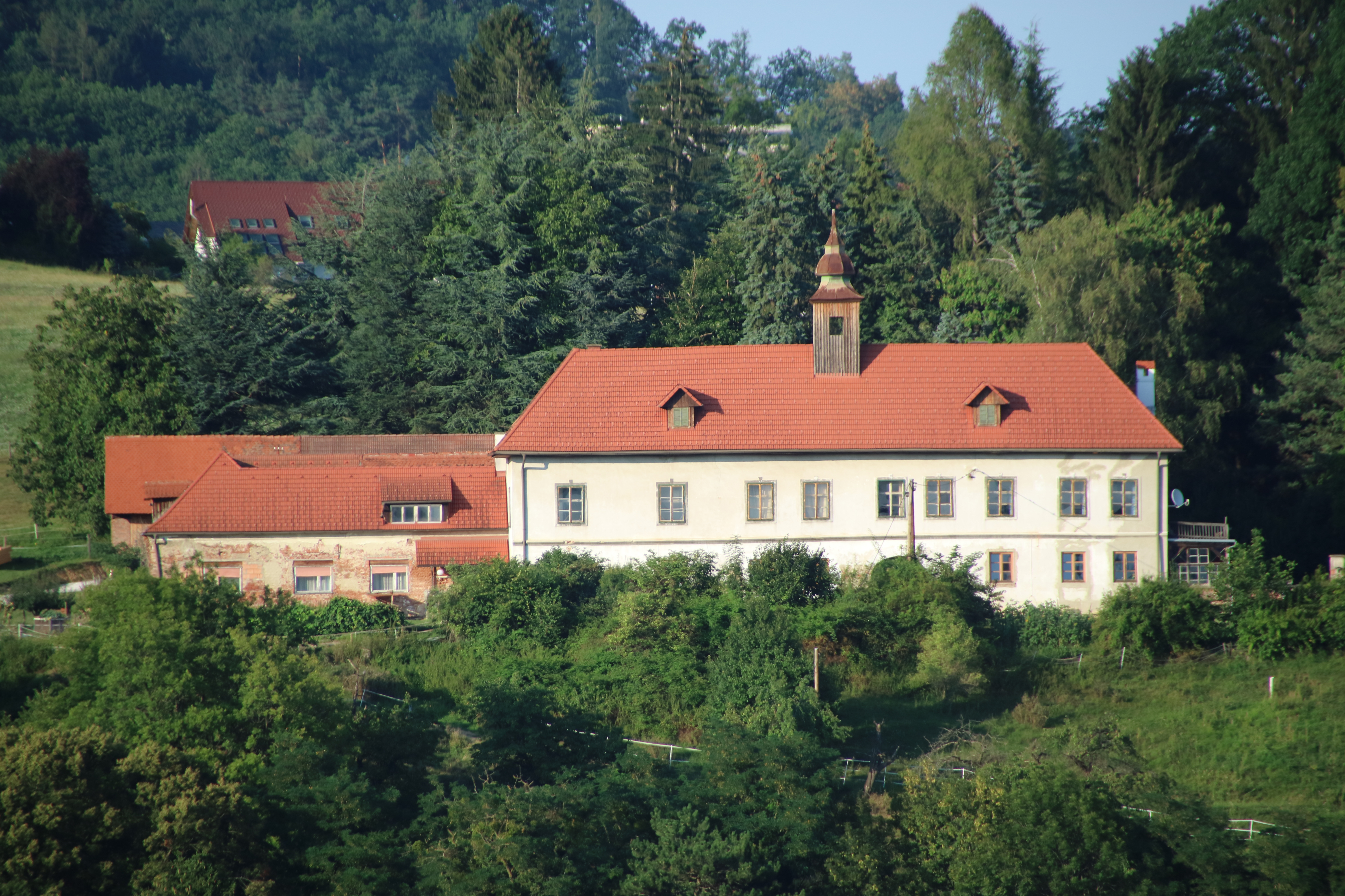 Schloss Kroisbach in Graz-Mariatrost (Steiermark)